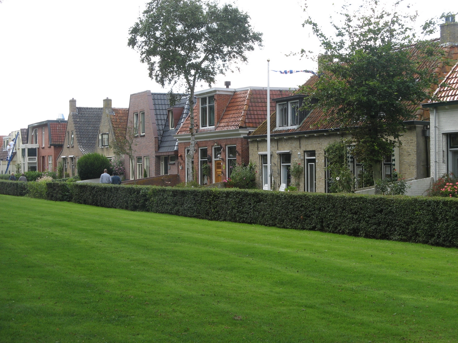 Schiermonnikoog